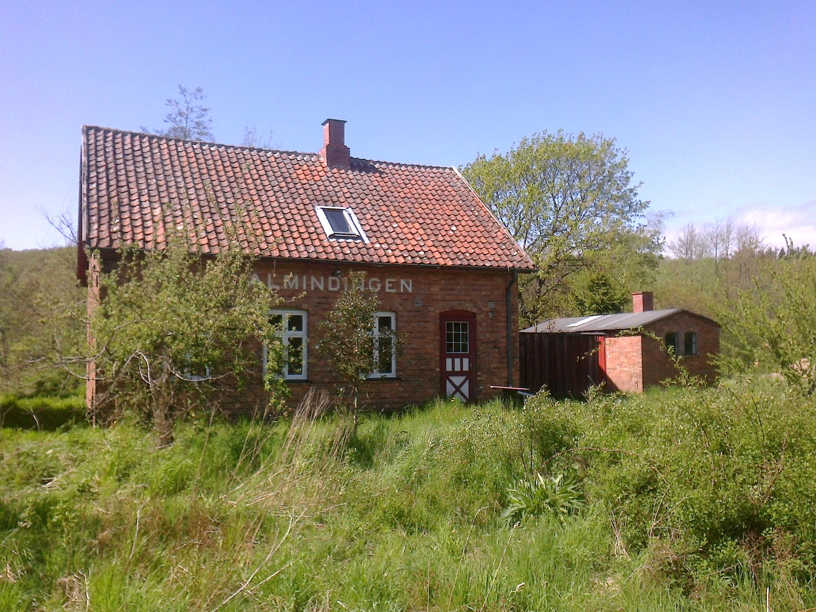 Almindingen Station, sporside